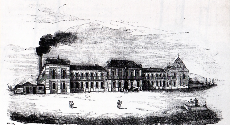 Grabado del siglo XIX en el que aparece la fachada principal del edificio de la Real Fábrica de Paños a la actual plaza de España.